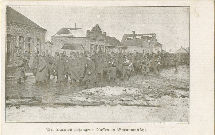 Беларуская (тарашкевіца): паштоўка часоў І Сусьветнай Вайны — калённа расейскіх палонных з-пад Дарава ў Баранавічах (Скробава-Гарадзішчанская апэрацыя)